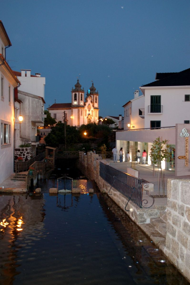 Cidade de Santa Comba Dão